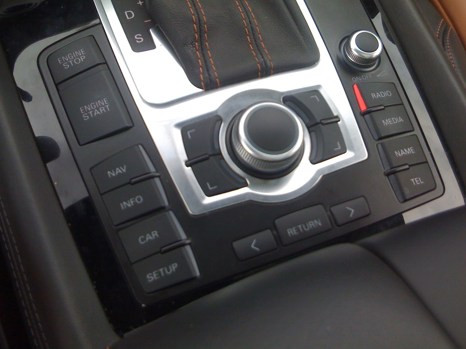 Główny sposób kontrolowania systemu MMI 2G